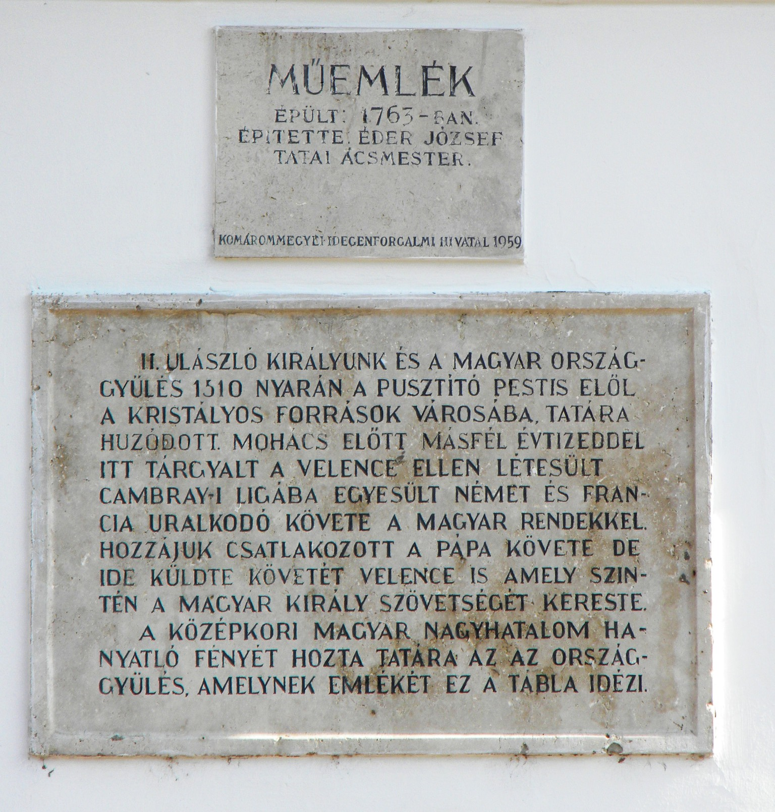 Az emléktáblák a Tatai Haranglábon láthatók, az Országgyűlés téren. A képre vonatkozó szócikk